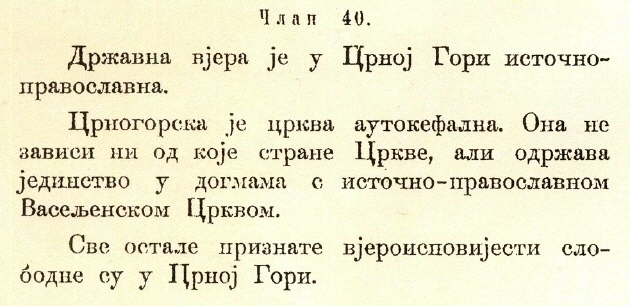 Ustav Kneževine Crne Gore iz 1905.g.